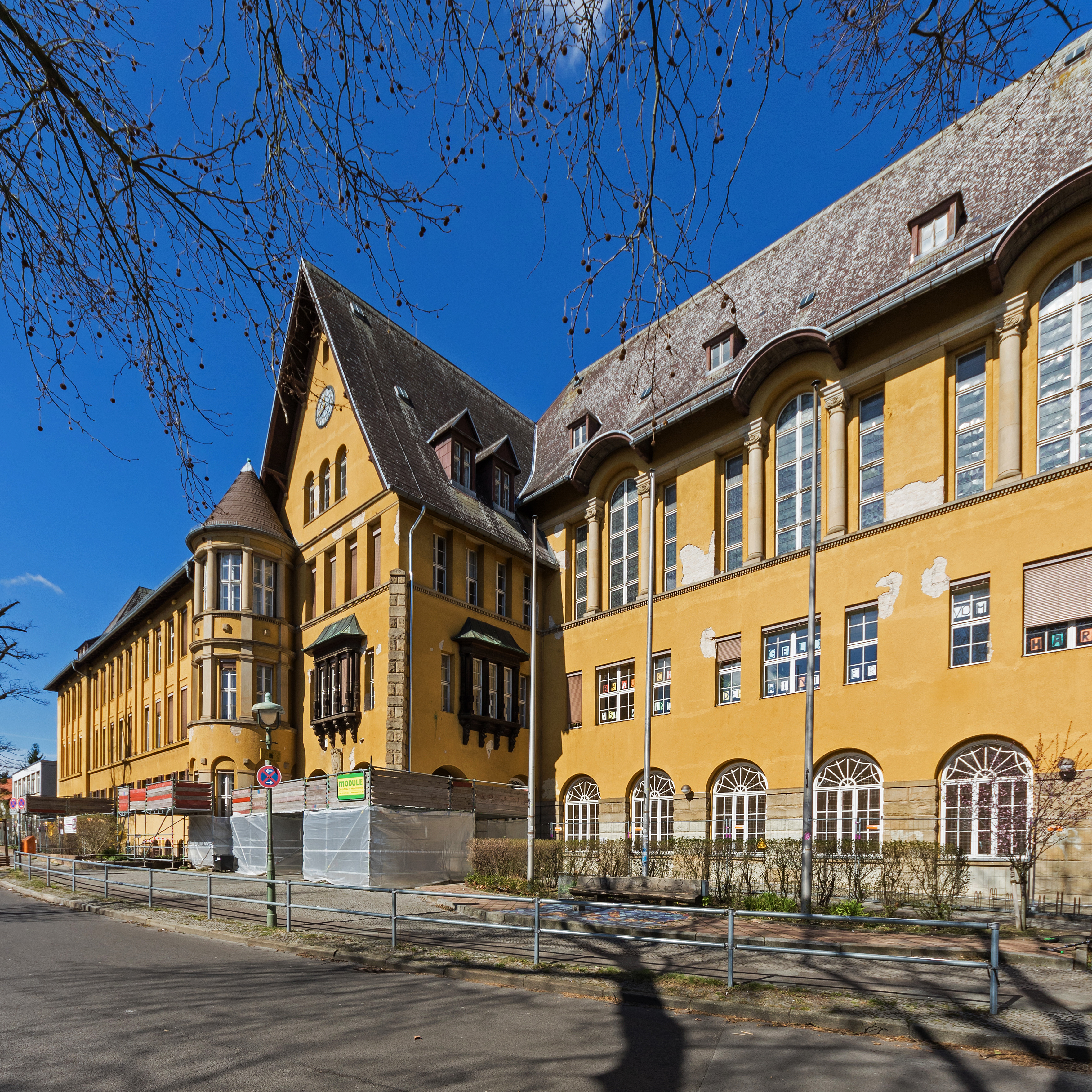 Die Fichtenberg-Oberschule in der Rothenburgstraße, Berlin-Steglitz